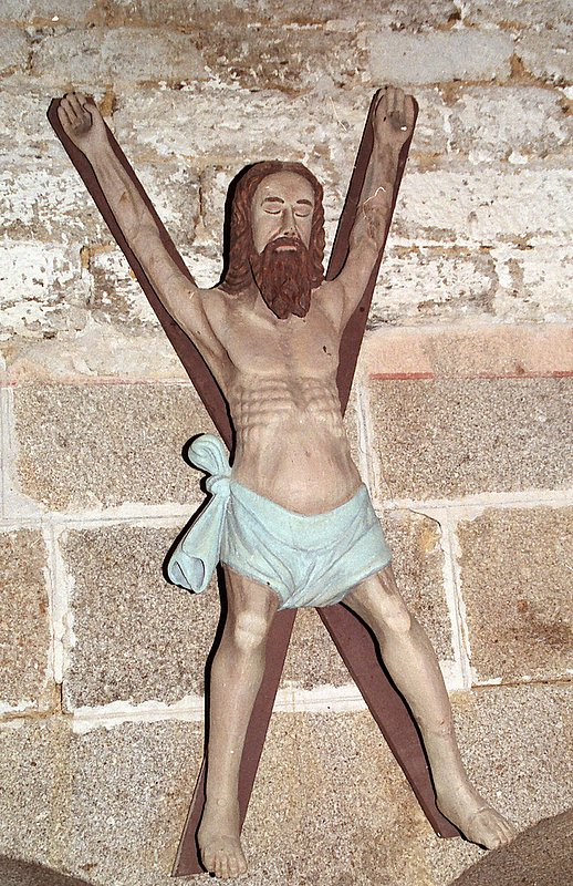 église Brasparts, denez goasguen.